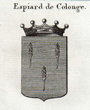 Wappen der Freiherrn Benignus Espiard von Colonge (1754-1837) und Franz Alexander Espiard von Colonge (1748–1814), bayerische Generale, französischer Abstammung